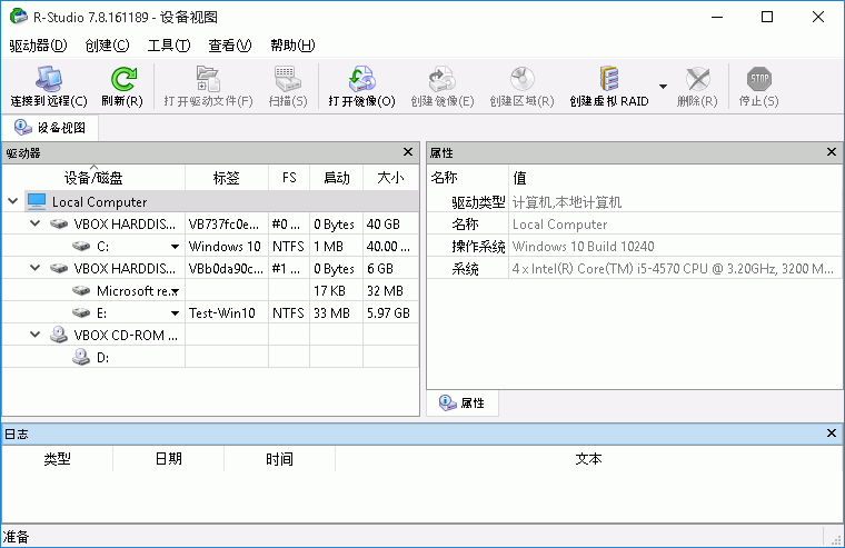 R-Studio的首页